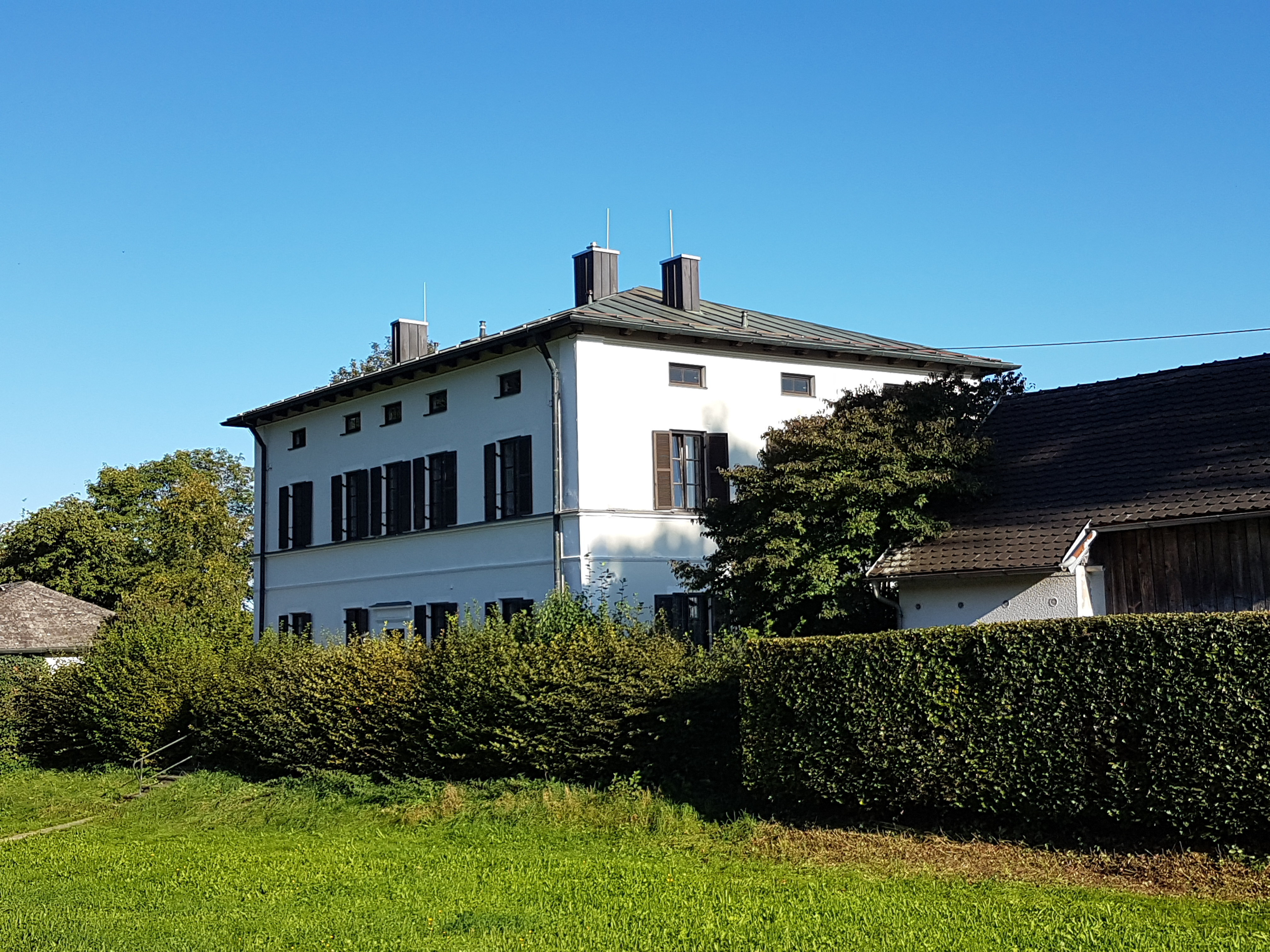 Asten (Tittmoning), Pfarrhof